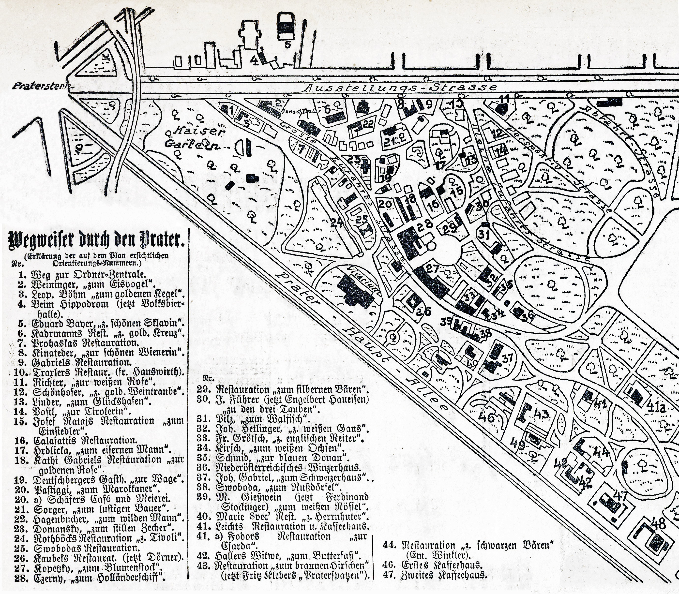 Wien, Prater, Betriebe zum 1. Mai 1914